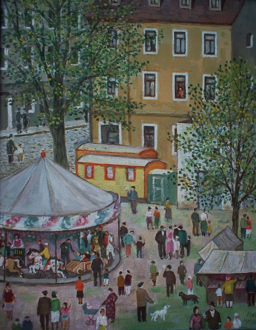 Ölbild "Rummelplatz" des Malers Max Merbt